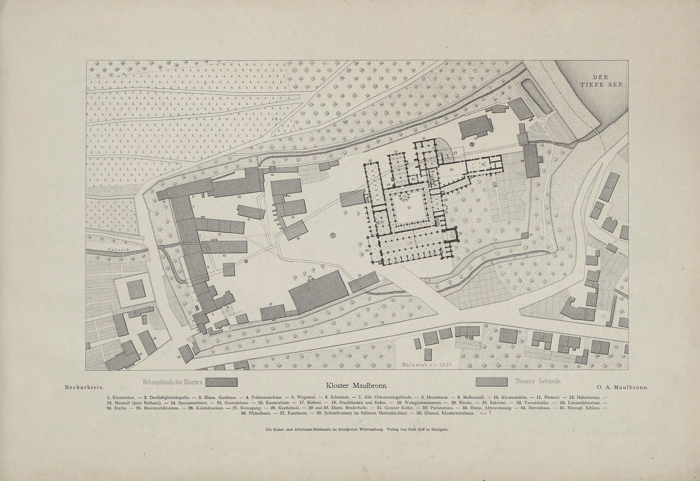 Lageplan des Klosters Maulbronn